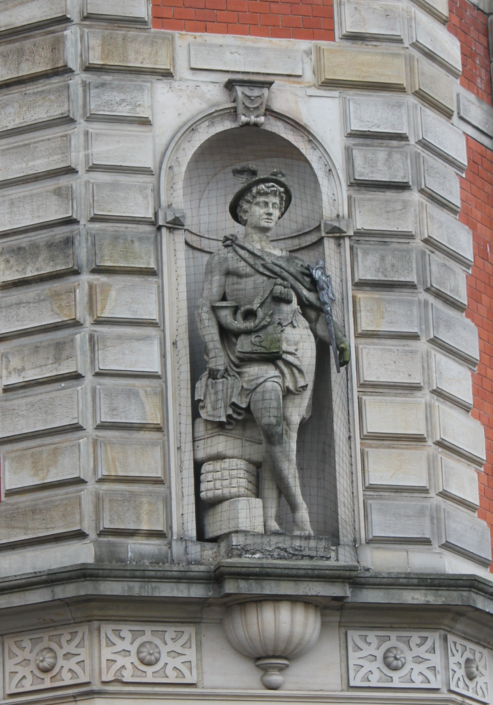 Hermes-Figur an der Alten Post (Flensburg)